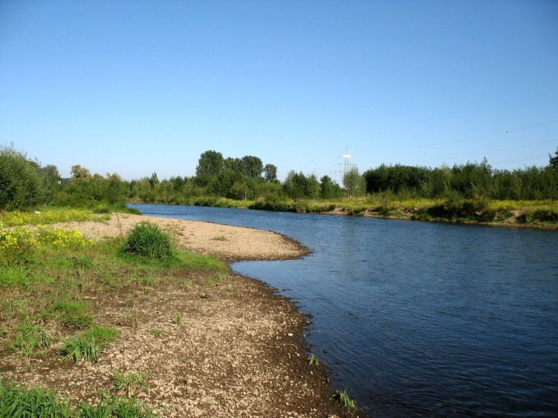 Renaturierter Rurabschnitt bei Ratheim (2006)